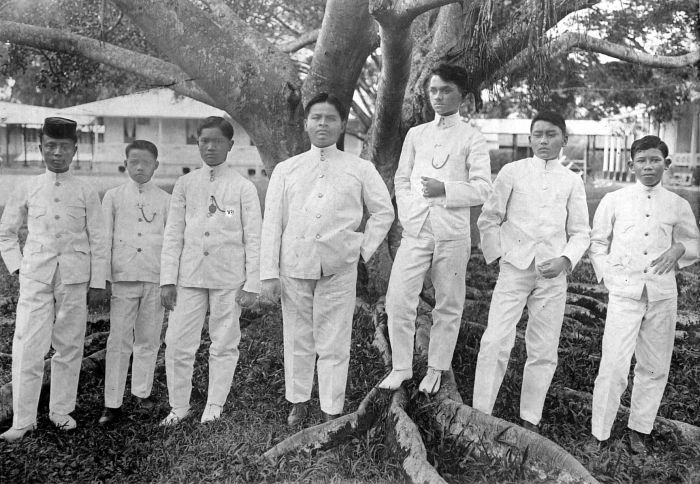 Repronegatief. Een groep leerlingen van de kweekschool te Fort de Kock